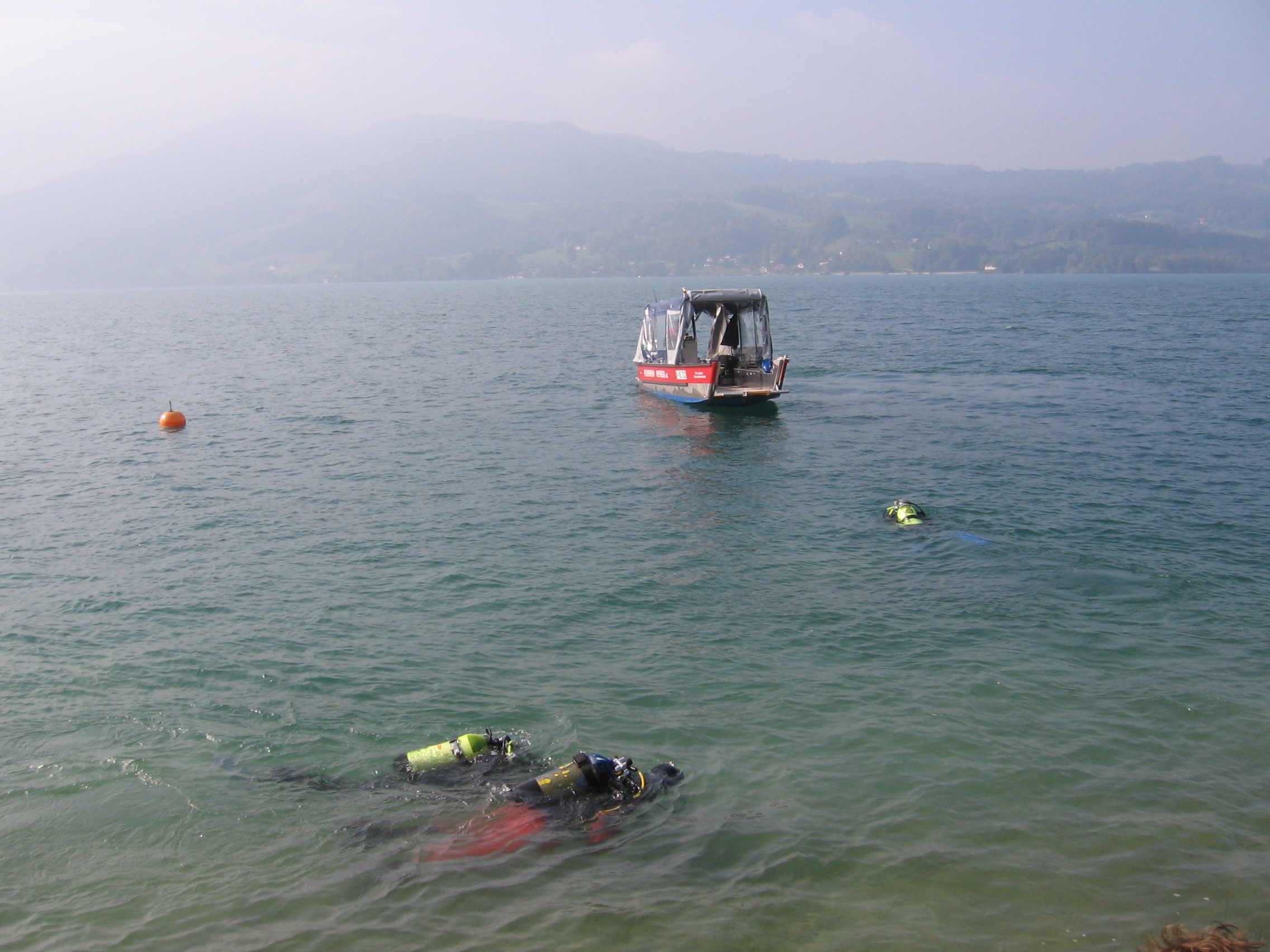 Feuerwehrtaucher beim Absuchen der Ufergegend / Fire brigade scuba divers searching at the waterside